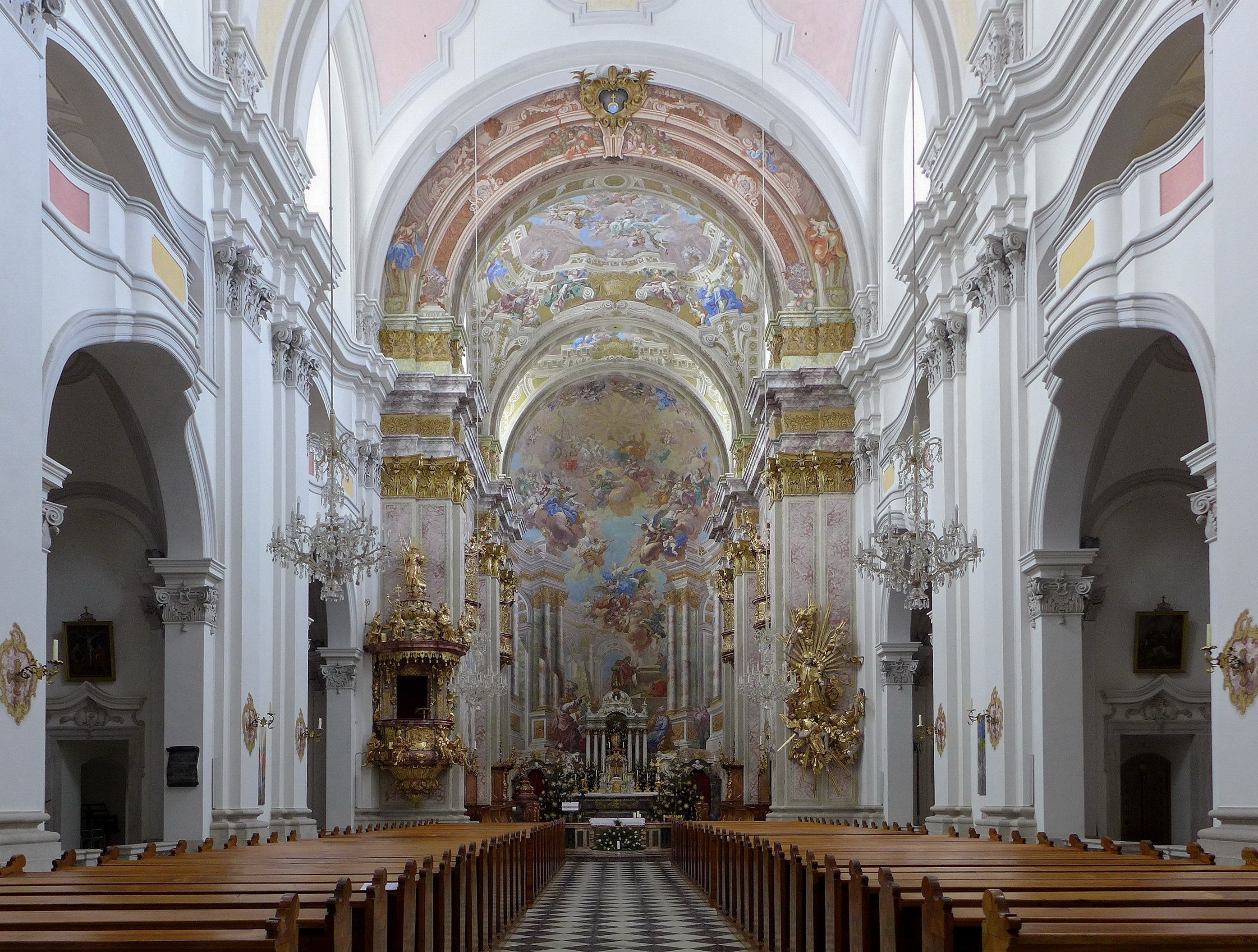 Stiftskirche Spital am Pyhrn, Innenraum